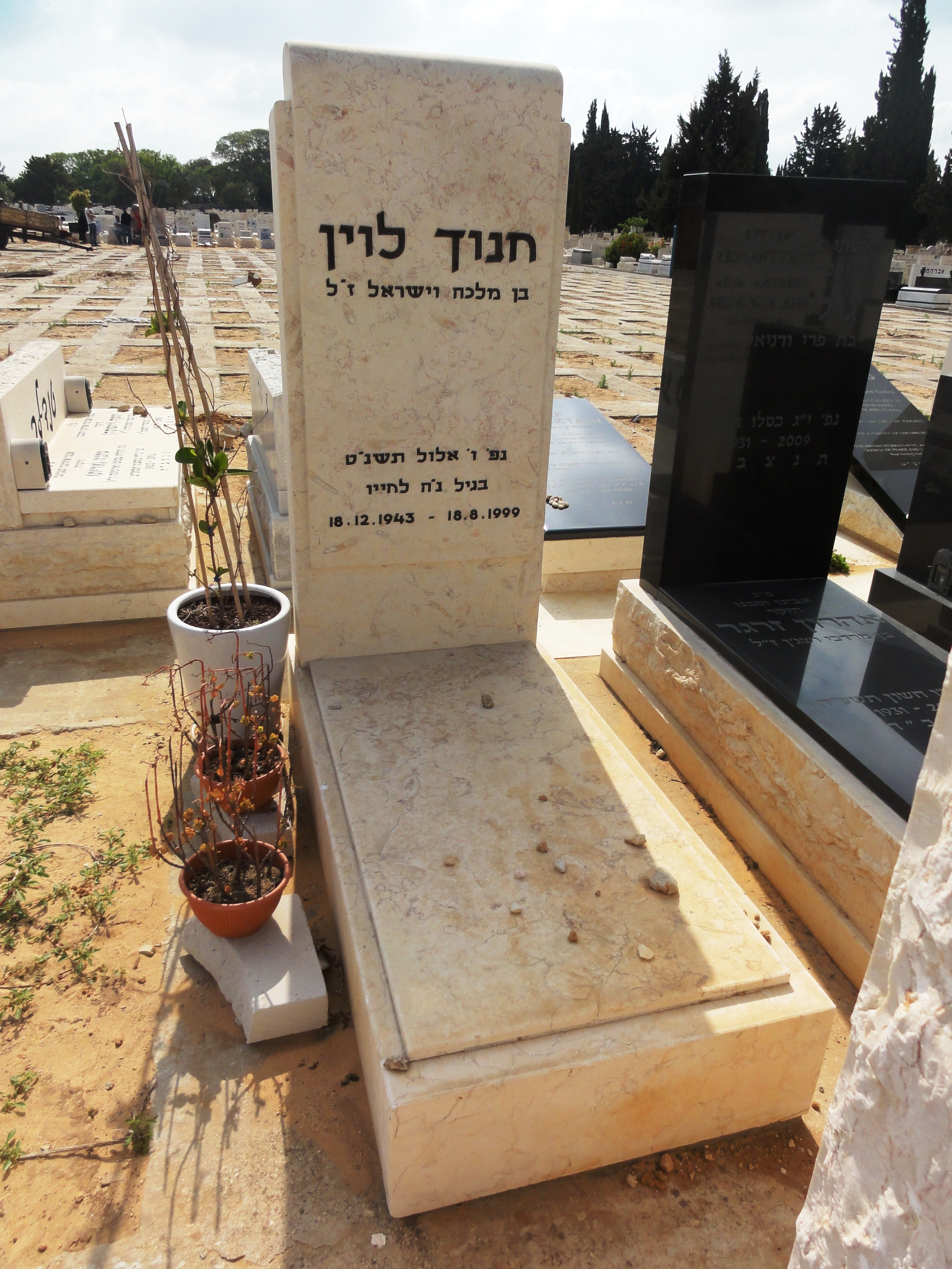 קברו של חנוך לוין